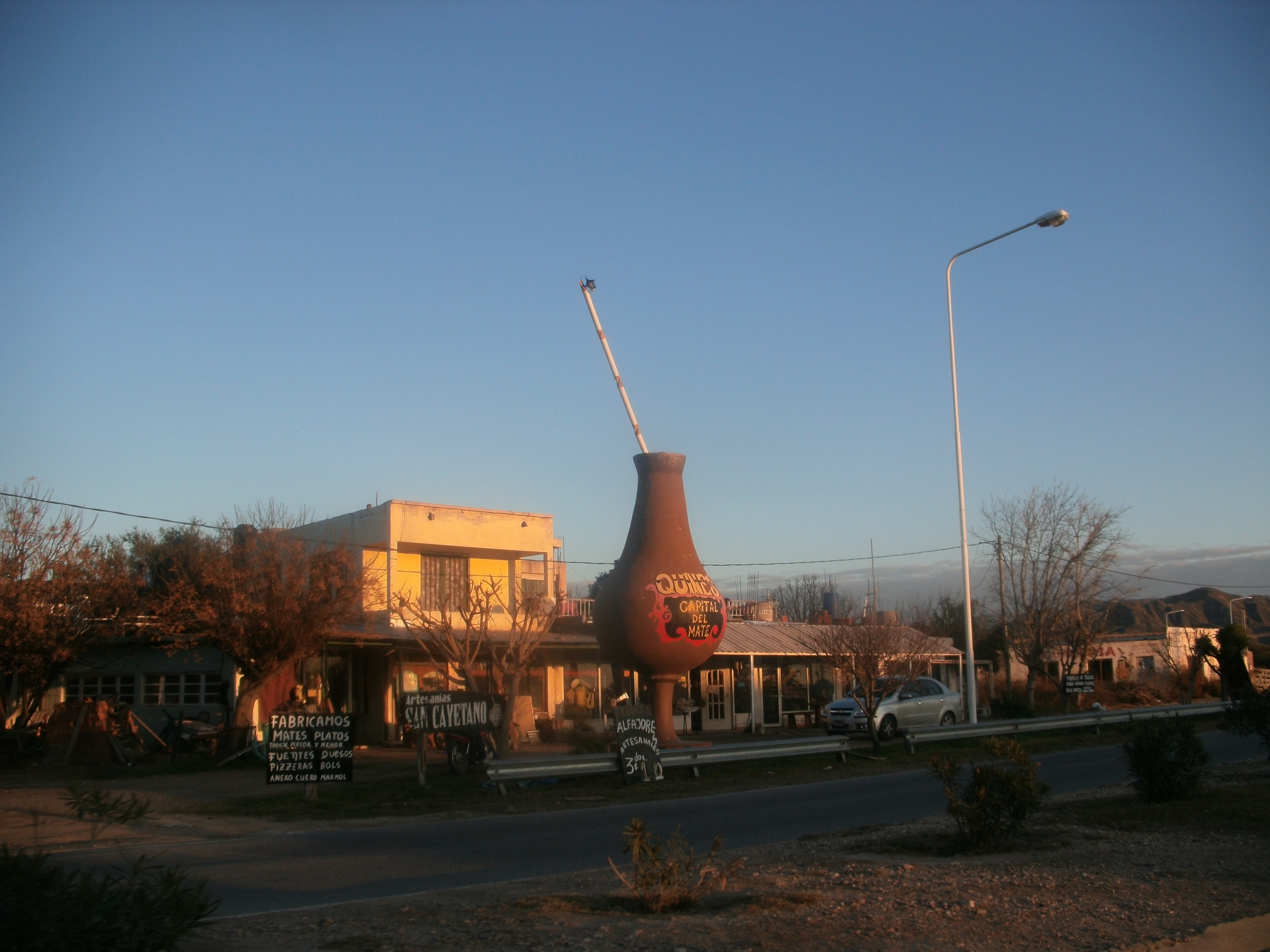 Ingreso a la localidad de Quines